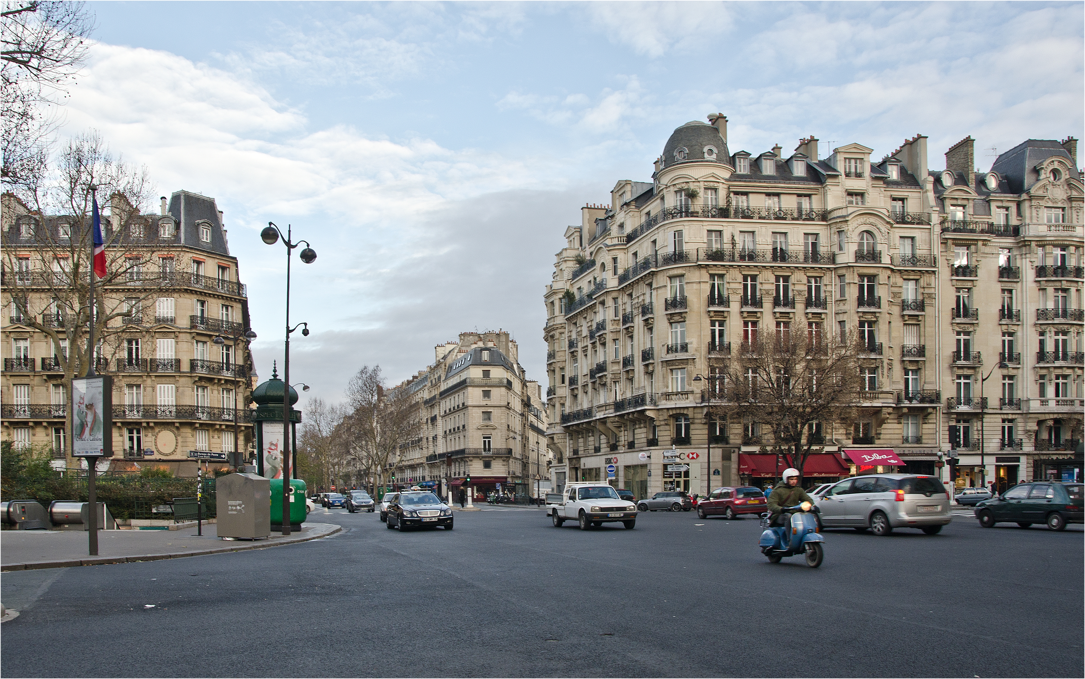 Boulevard Raspail, Paris.